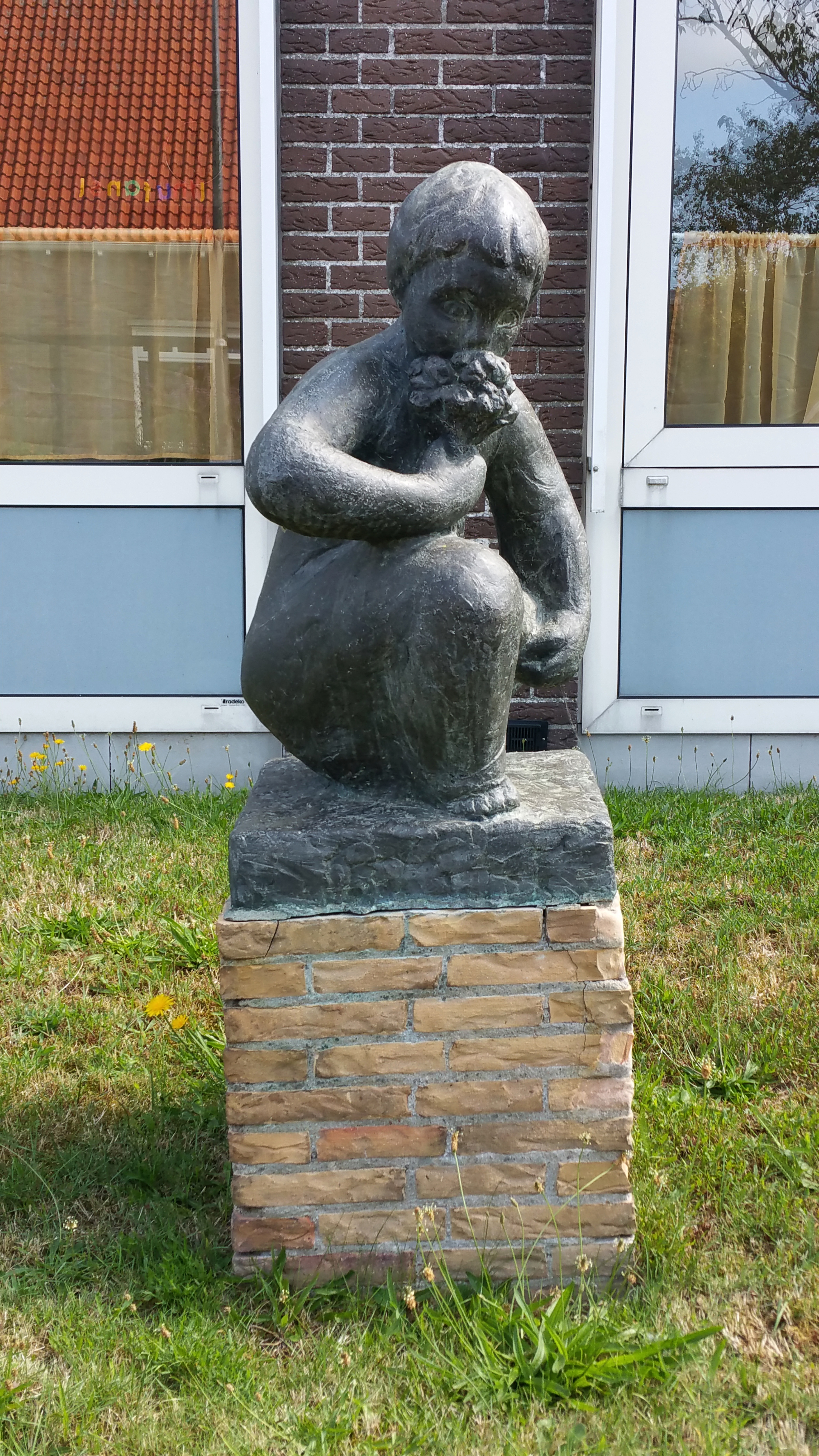 Sculptuur "Het plukkende meisje" uit 1968 van Jeanne Kouwenaar-Bijlo aan de Beatrixlaan 46 in Den Burg (Jozefschool)